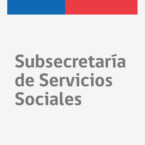 Logotipo de la Subsecretaría de Servicios Sociales de Chile